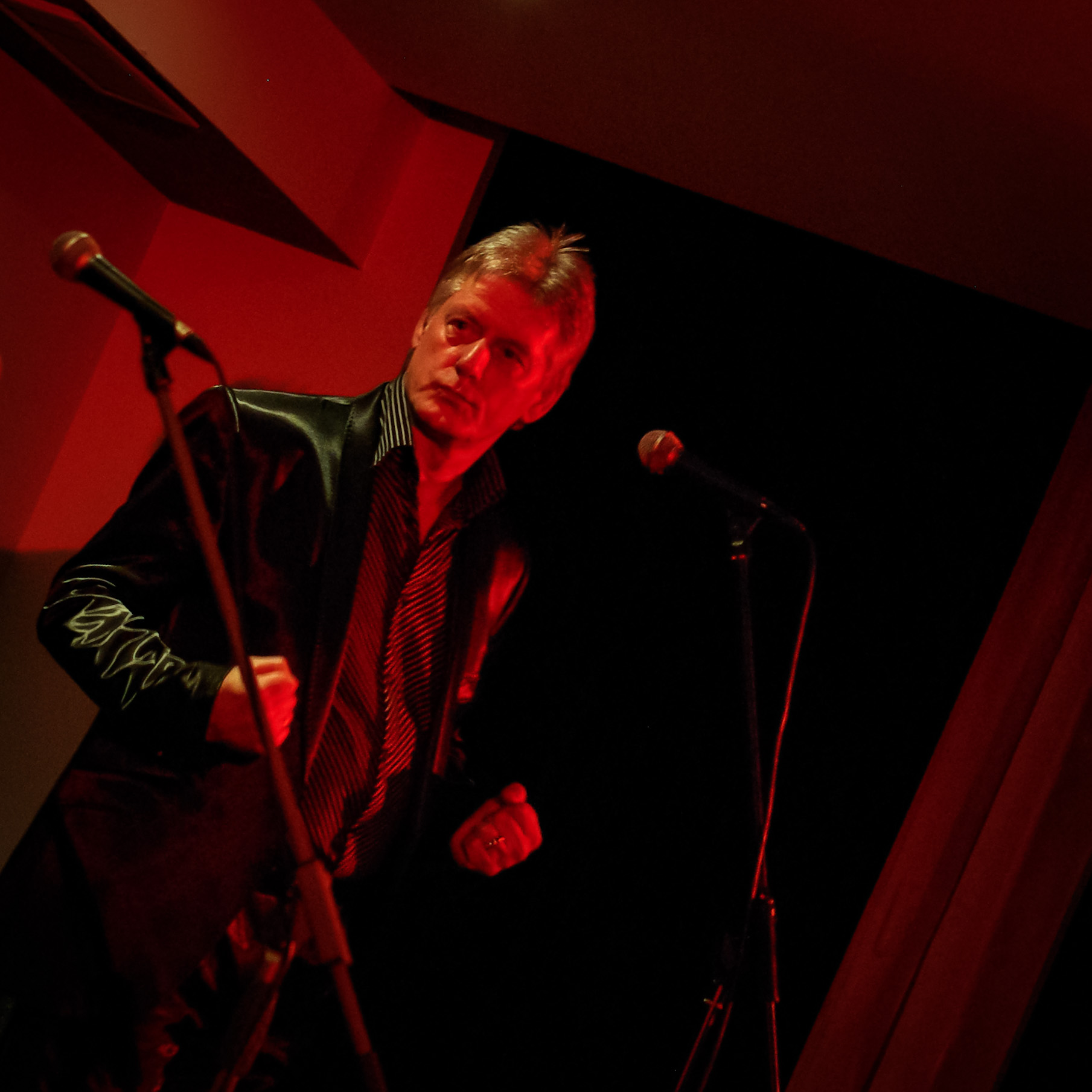 V.Zemgals, grupu „DZINTARA LELLES” un „EOLIKA” dalībnieks, solomākslinieks. Popmūziķis.